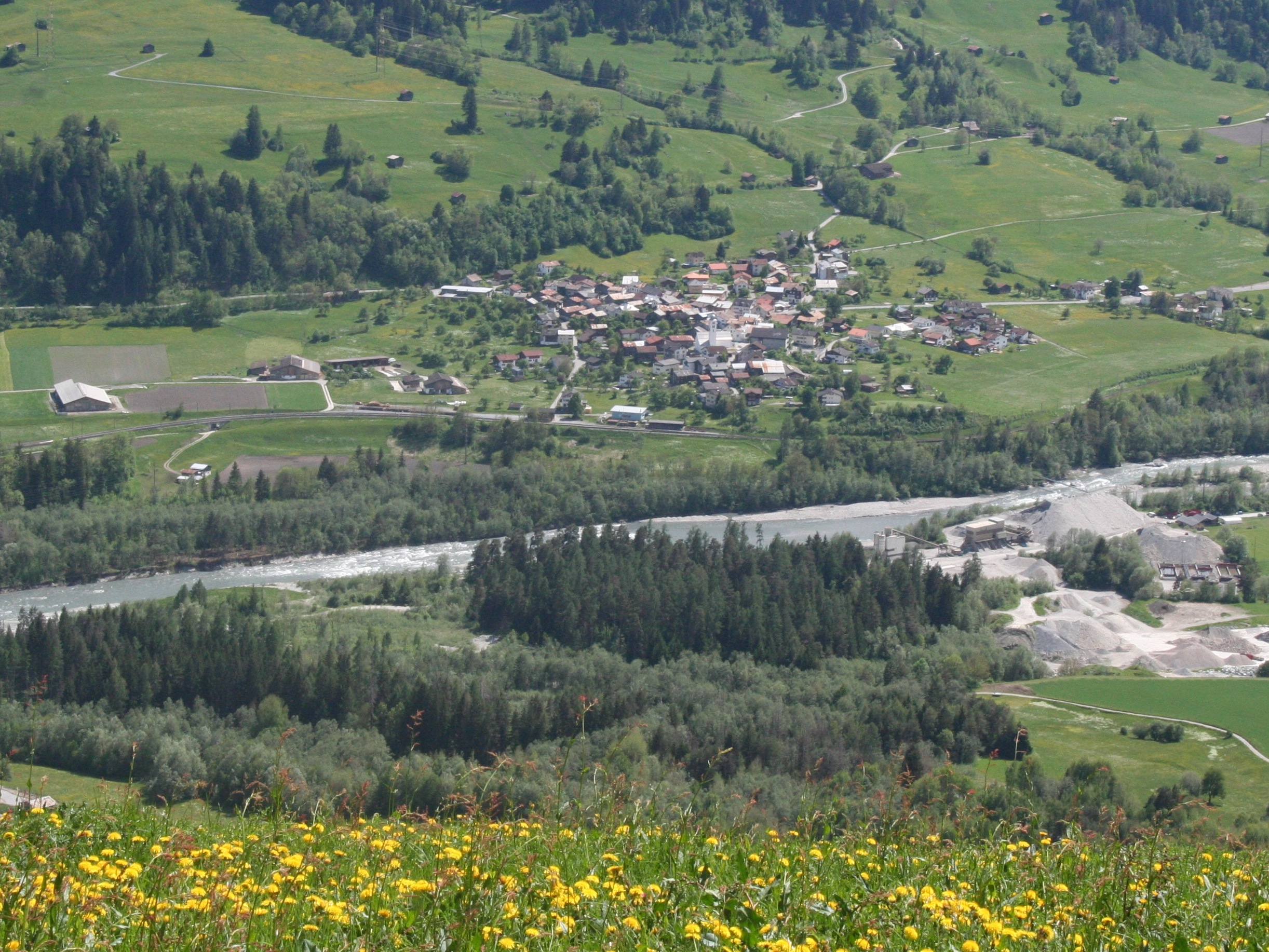 Castrisch von Falera aus gesehen